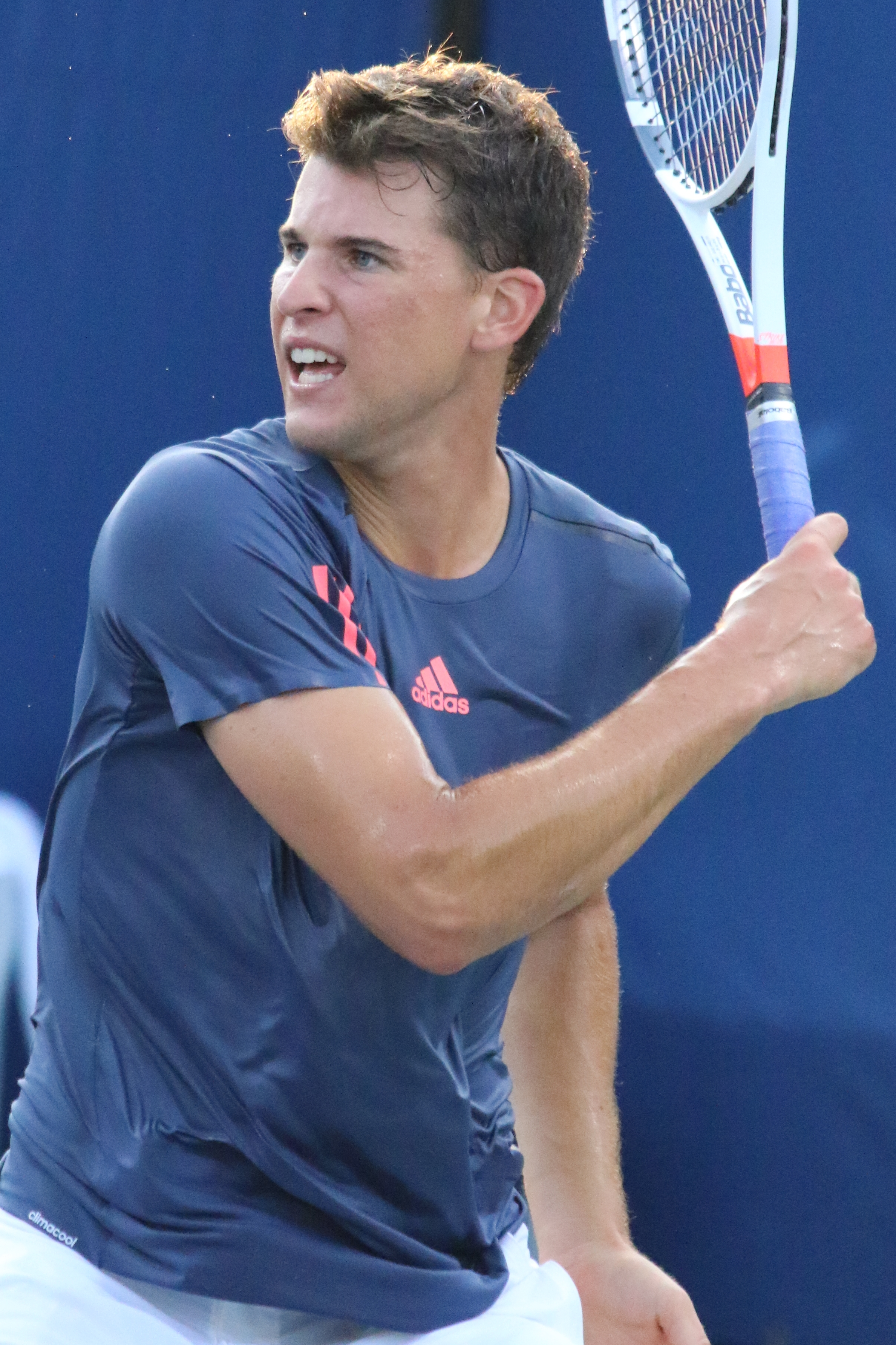 Thiem US16 (57)